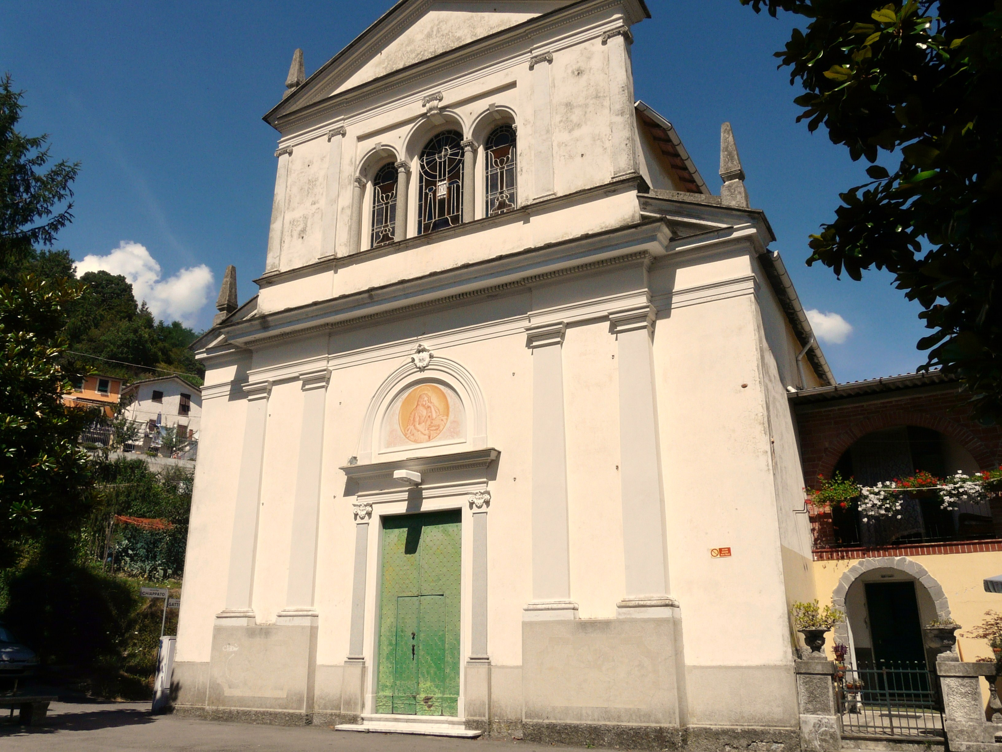 Chiesa di Santa Maria Maddalena, Lumarzo, Liguria, Italia